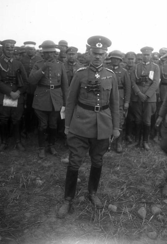 Generalleutnant Hasse